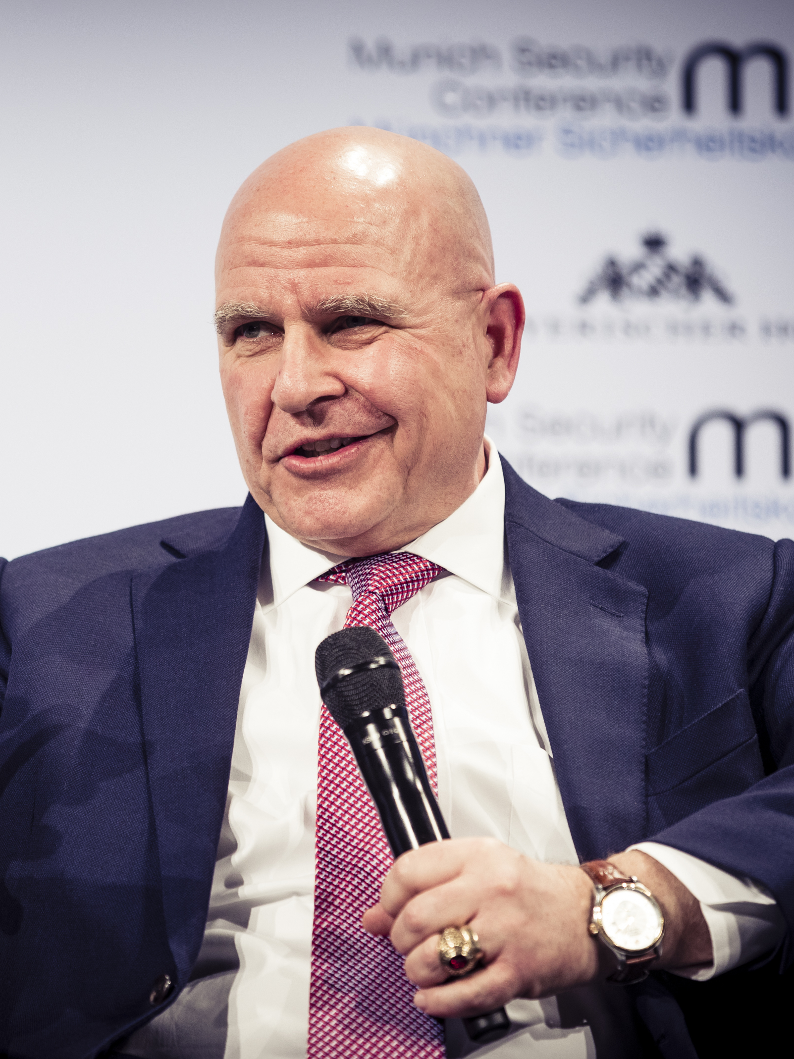 Herbert Raymond McMaster während der Münchener Sicherheitskonferenz 2018